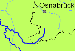 Glaneverlauf